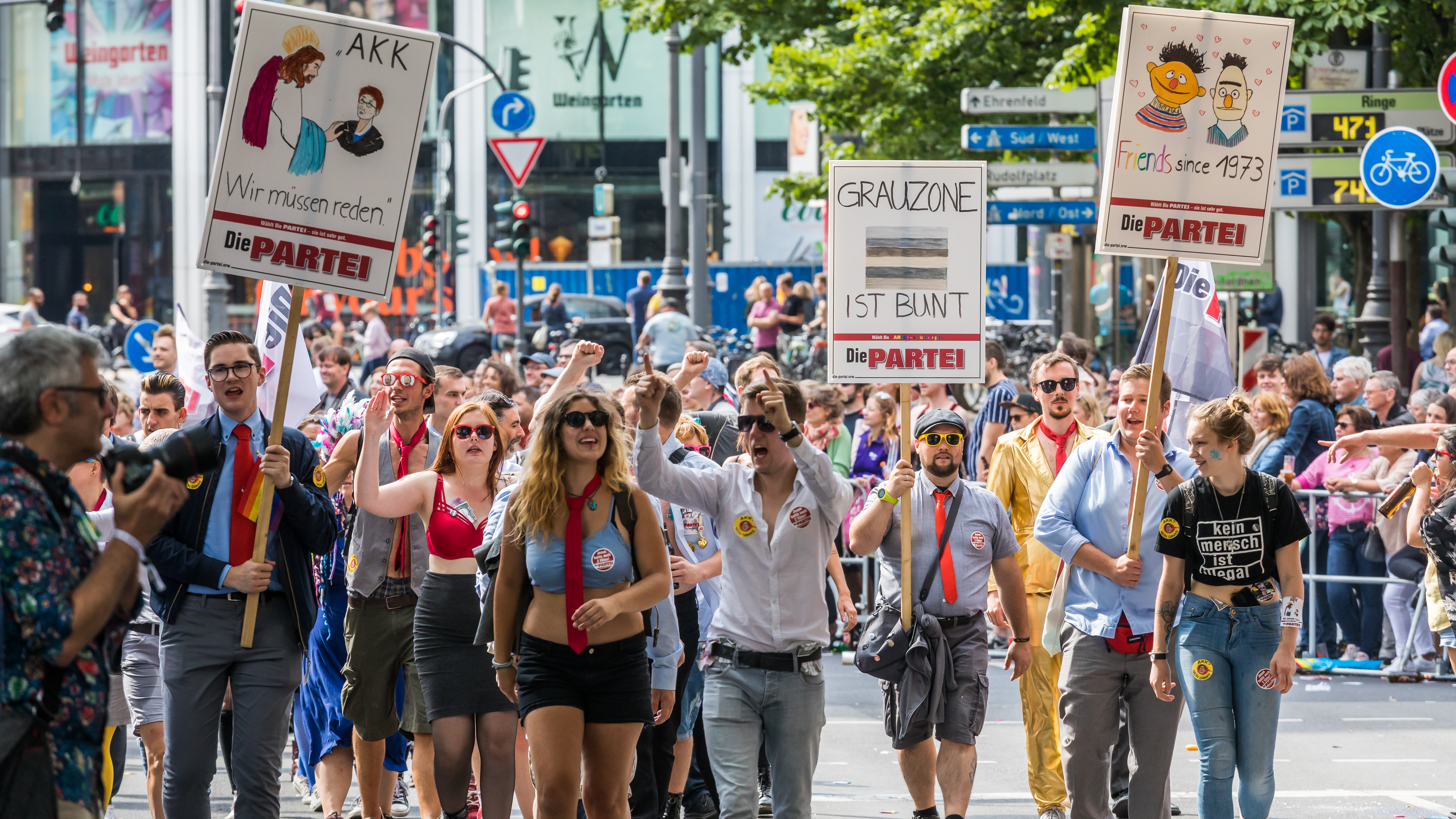 ColognePride - CSD-Parade Foto: Fußgruppe der Partei „Die PARTEI“